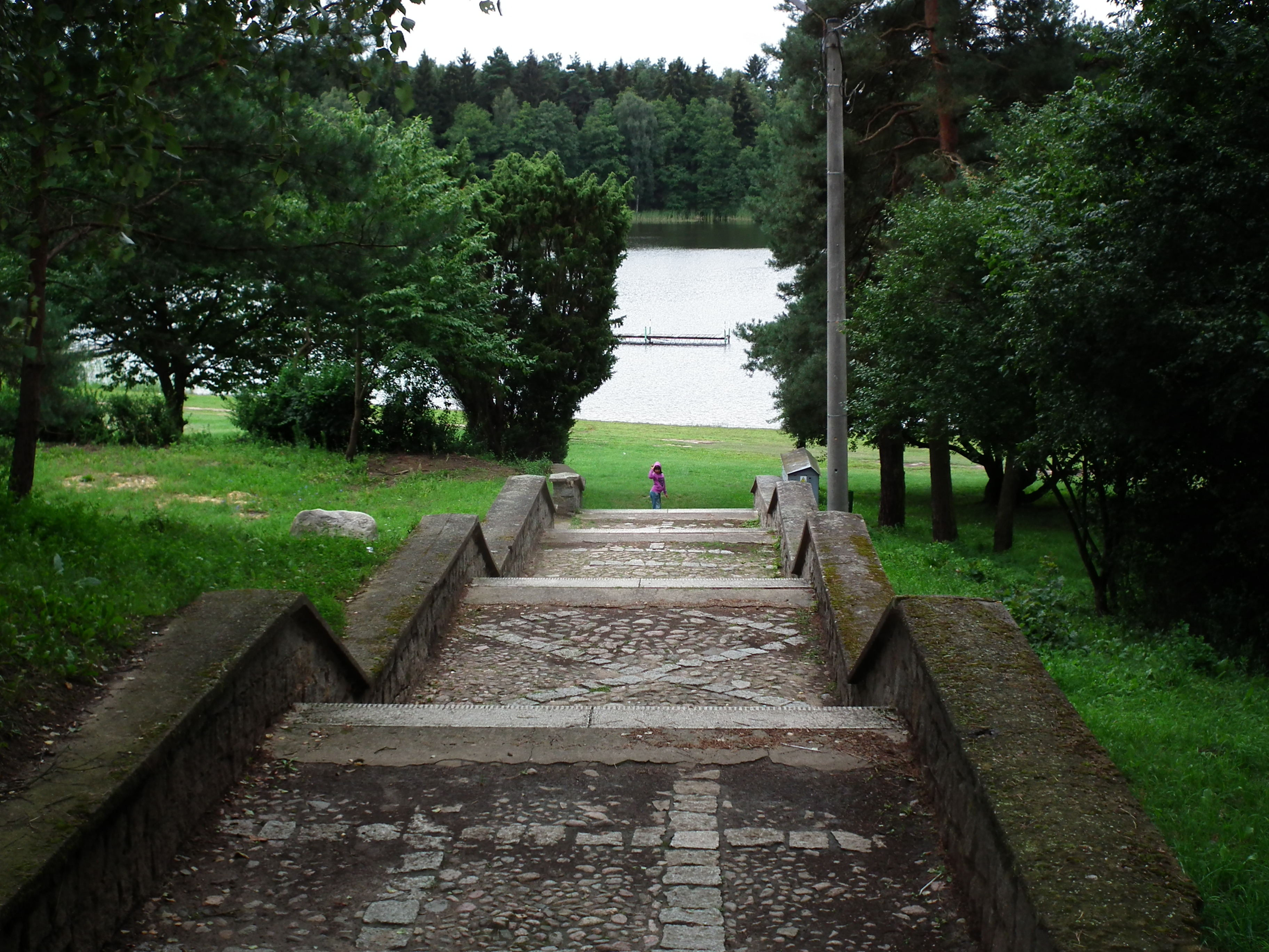 Jezioro Mormin koło miasta Ostroróg.